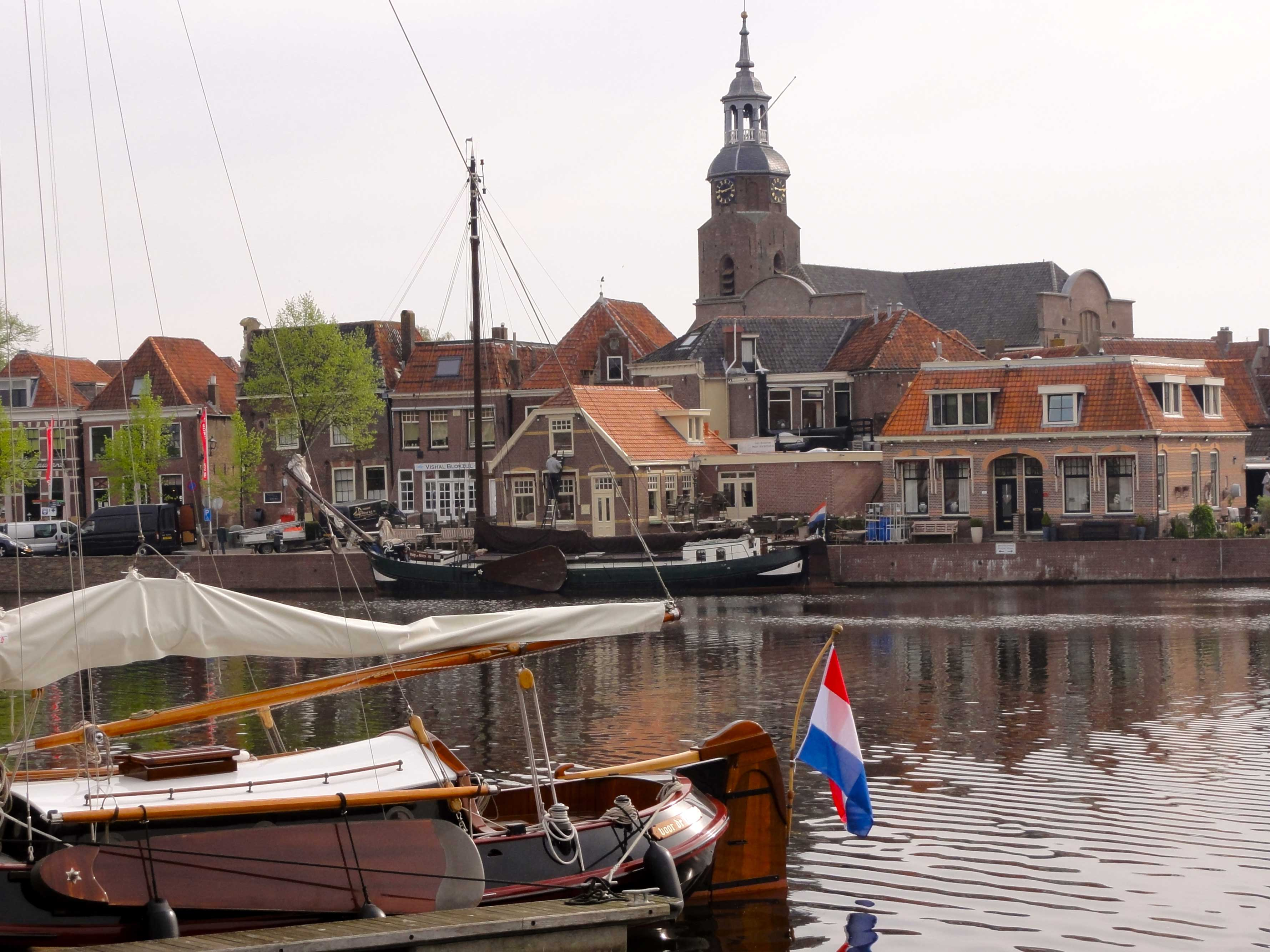 Blokzijl Havenkolk (rijksmonument)